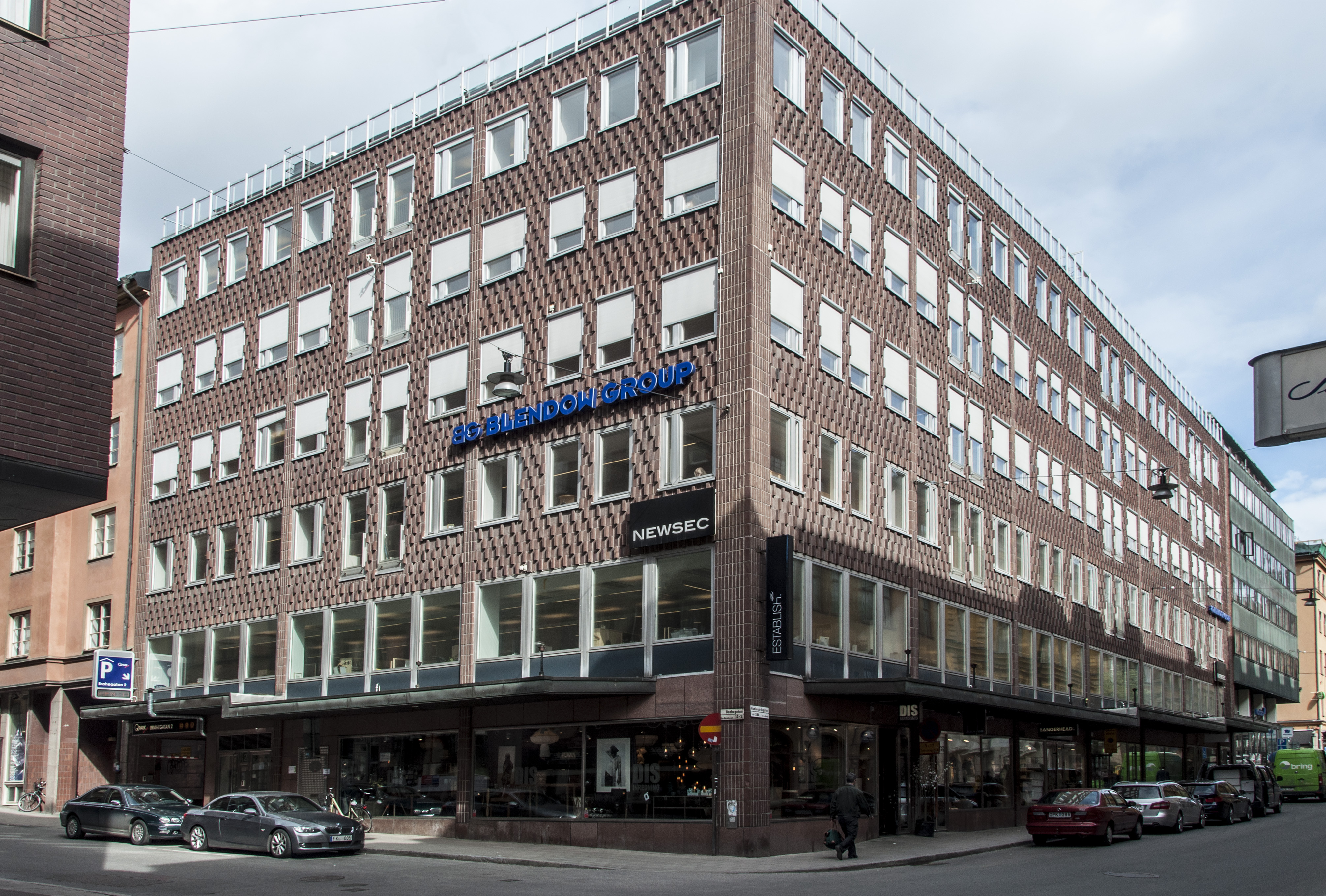 Skvalberget 34, Humlegårdsgatan 14, Brahegatan, Nybyggnadsår 1969 - 1973, Bengt Hultmark Arkitekt) BPA Byggproduktion AB (Byggmästare) Ränte- och Kapitalförsäkringsanstalten (Byggherre)